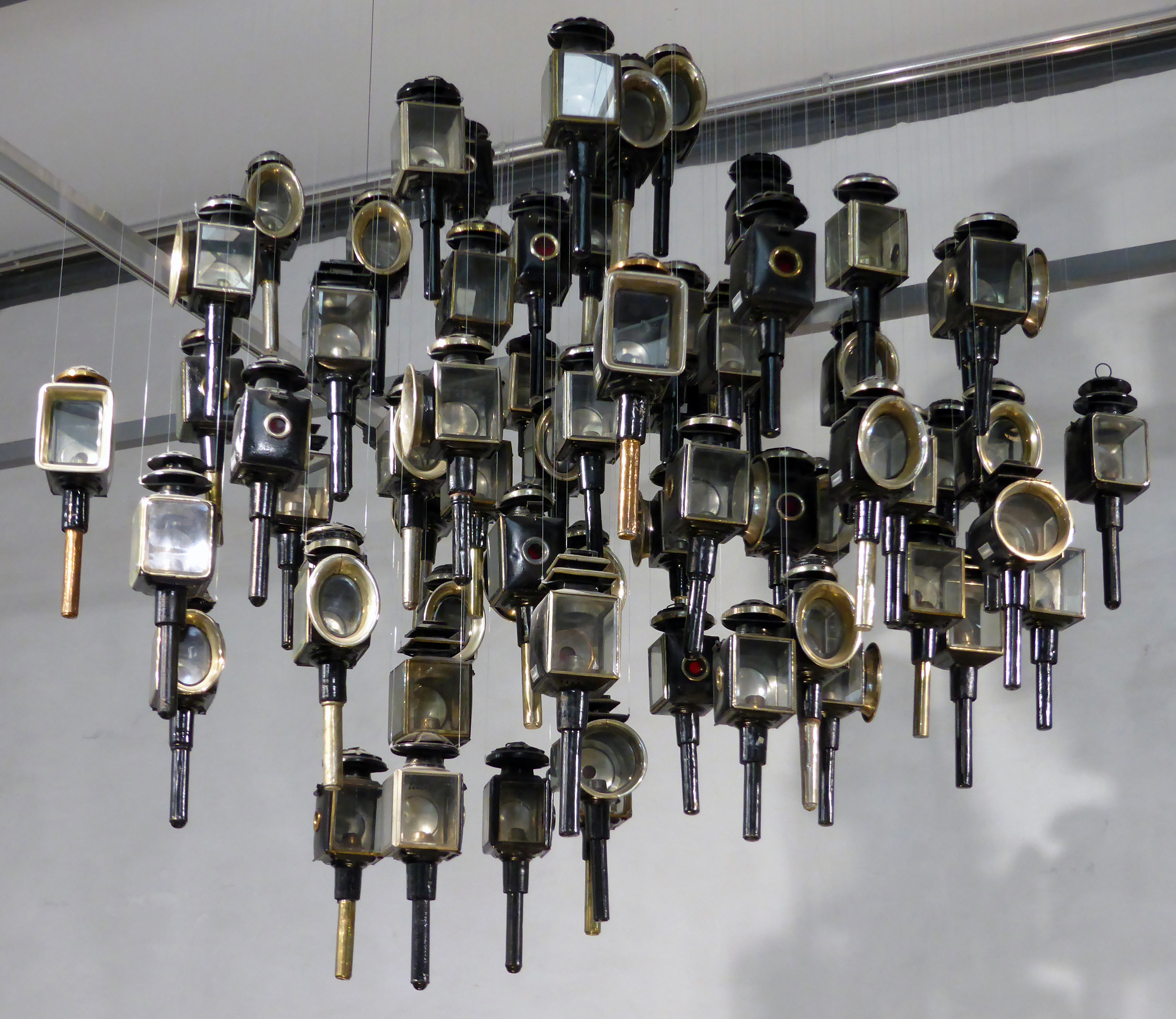 Sammlung von Kutschenlampen. Ausgestellt im Deutschen Technikmuseum in Berlin. Wikipedianische KulTour am 10. Oktober 2015 in der Ausstellung des Museums.